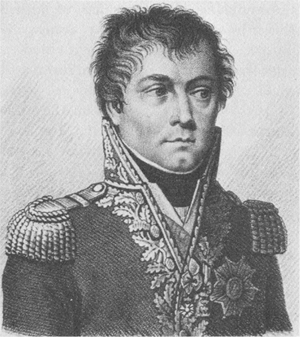 Général_Antoine_François_Andreossy